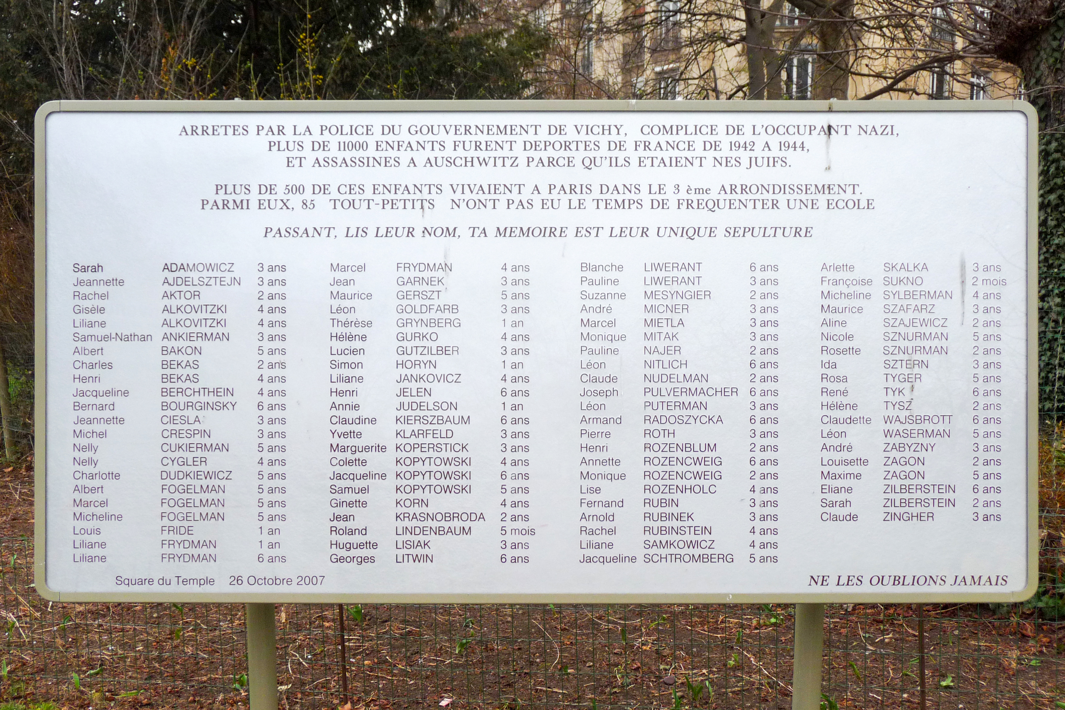 Stèle commémorative aux enfants juifs non encore scolarisés déportés pendant la Seconde Guerre Mondiale. Square du Temple, Paris 3è. Inaugurée le 26 octobre 2007.